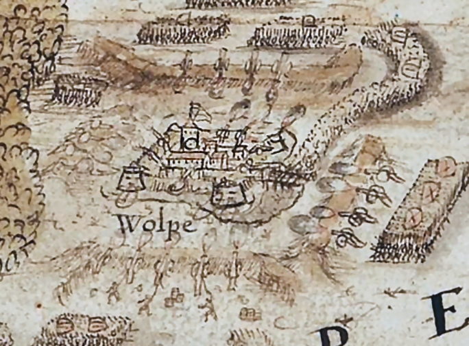 Burg Wölpe belagert in der Hildesheimer Stiftsfehde